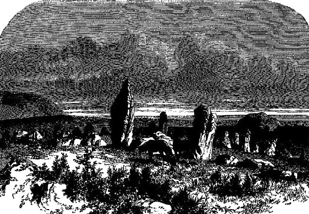 Camaret: pierres celtiques